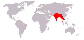 Bewerking afbeelding: afbeelding_(kaart).JPG